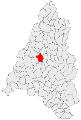 Categorie:Hărţi ale judeţului Bihor